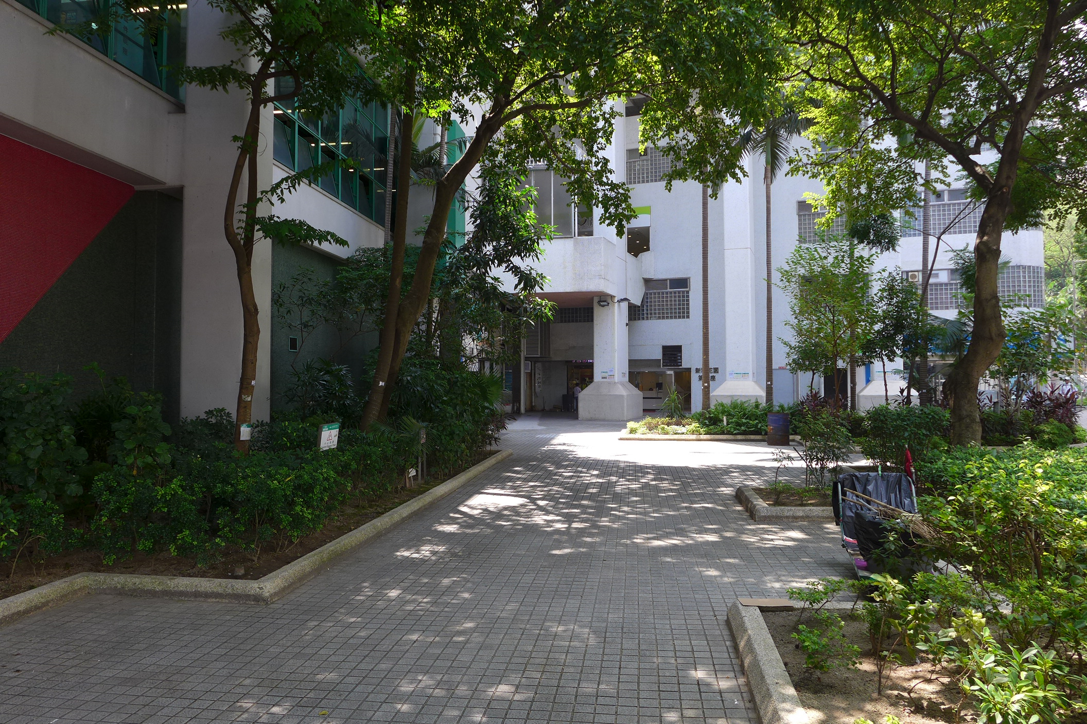 New Jade Garden GF open space